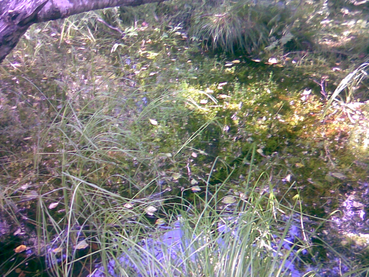 Žemaitėška: Šėtuo pelkie kažkor īr kūlgrinds :D